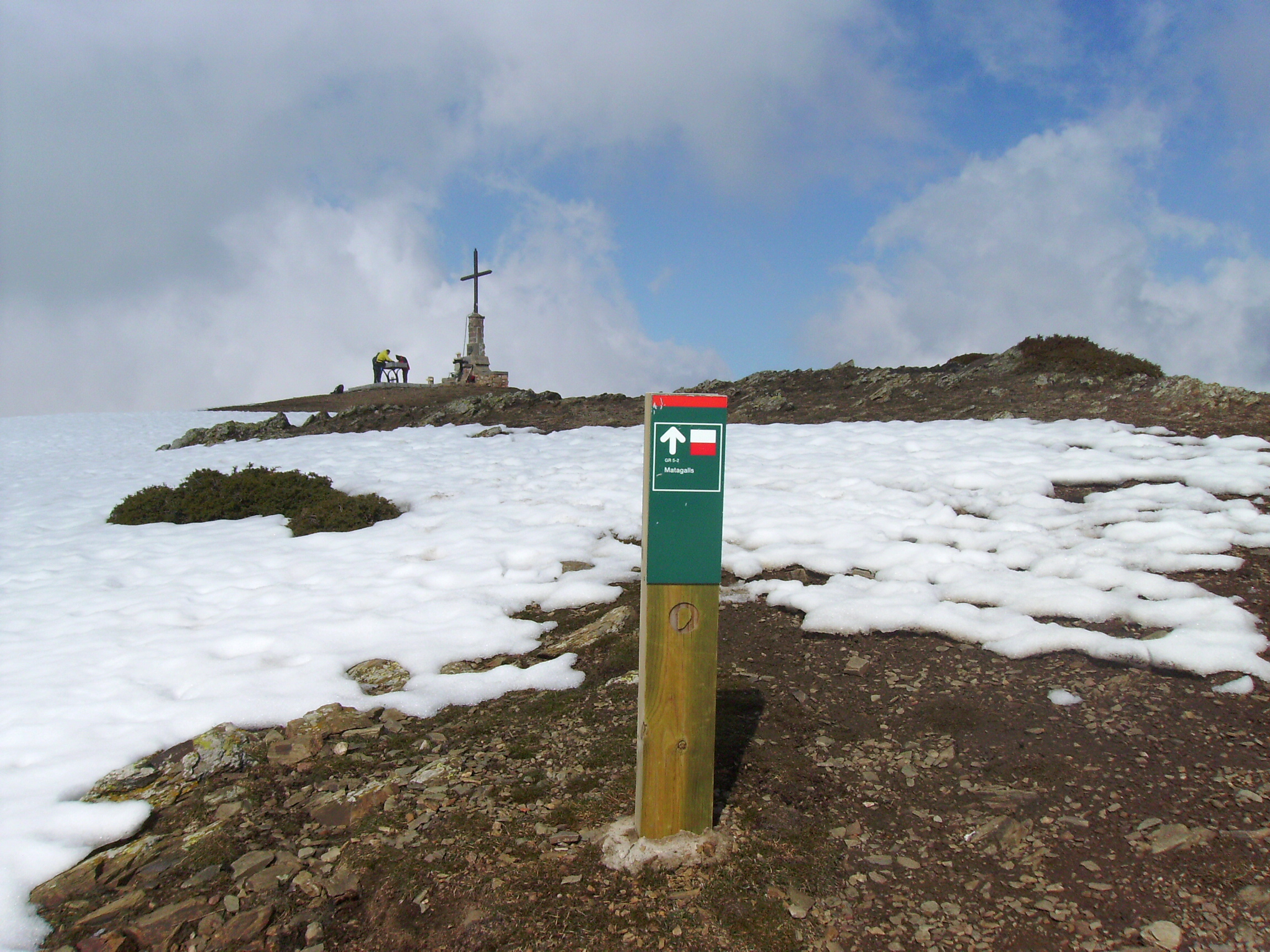 Cim del Matagalls, al massis del Montseny